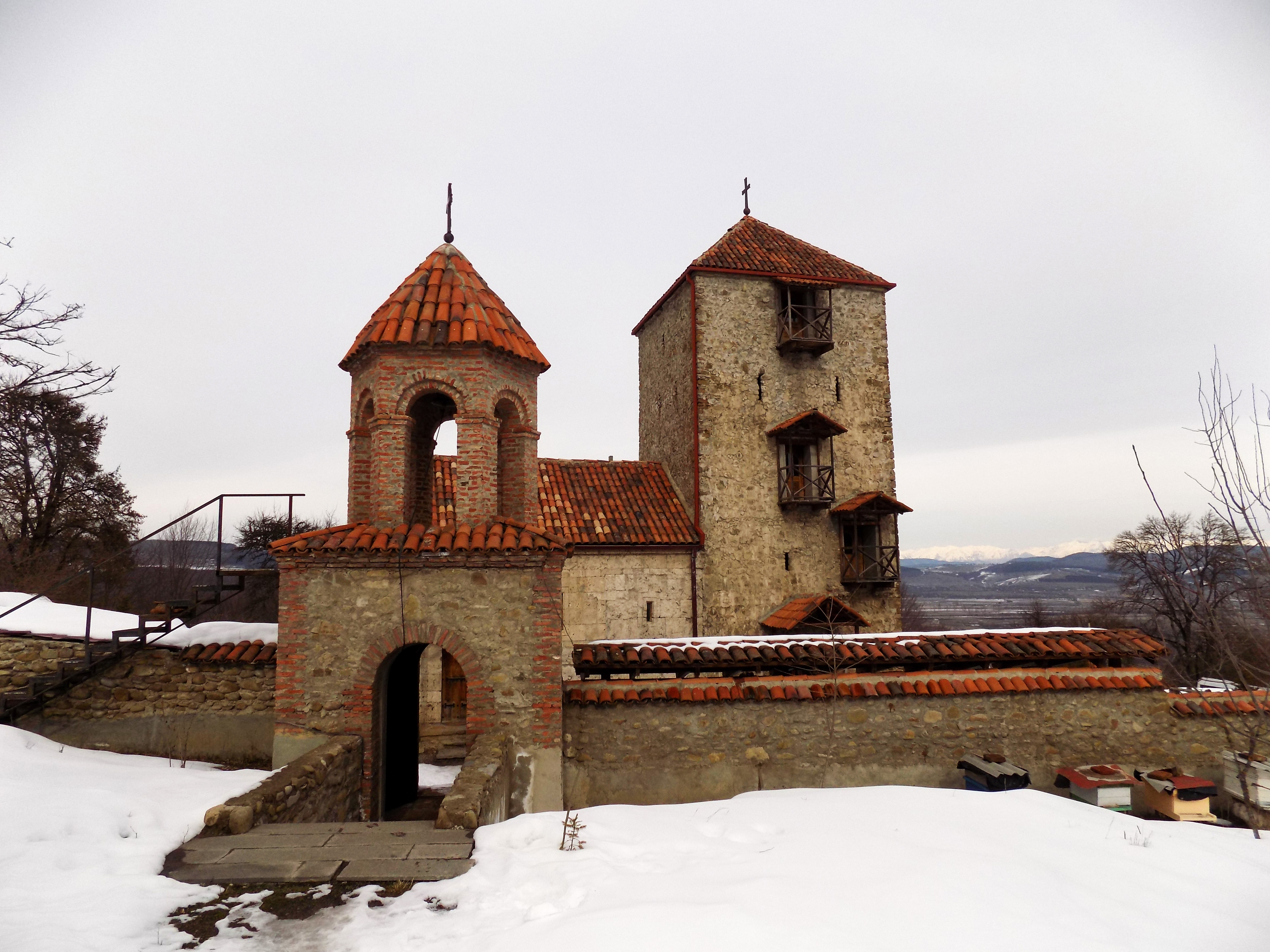 არჩილის მონასტერი, კომპლექსი